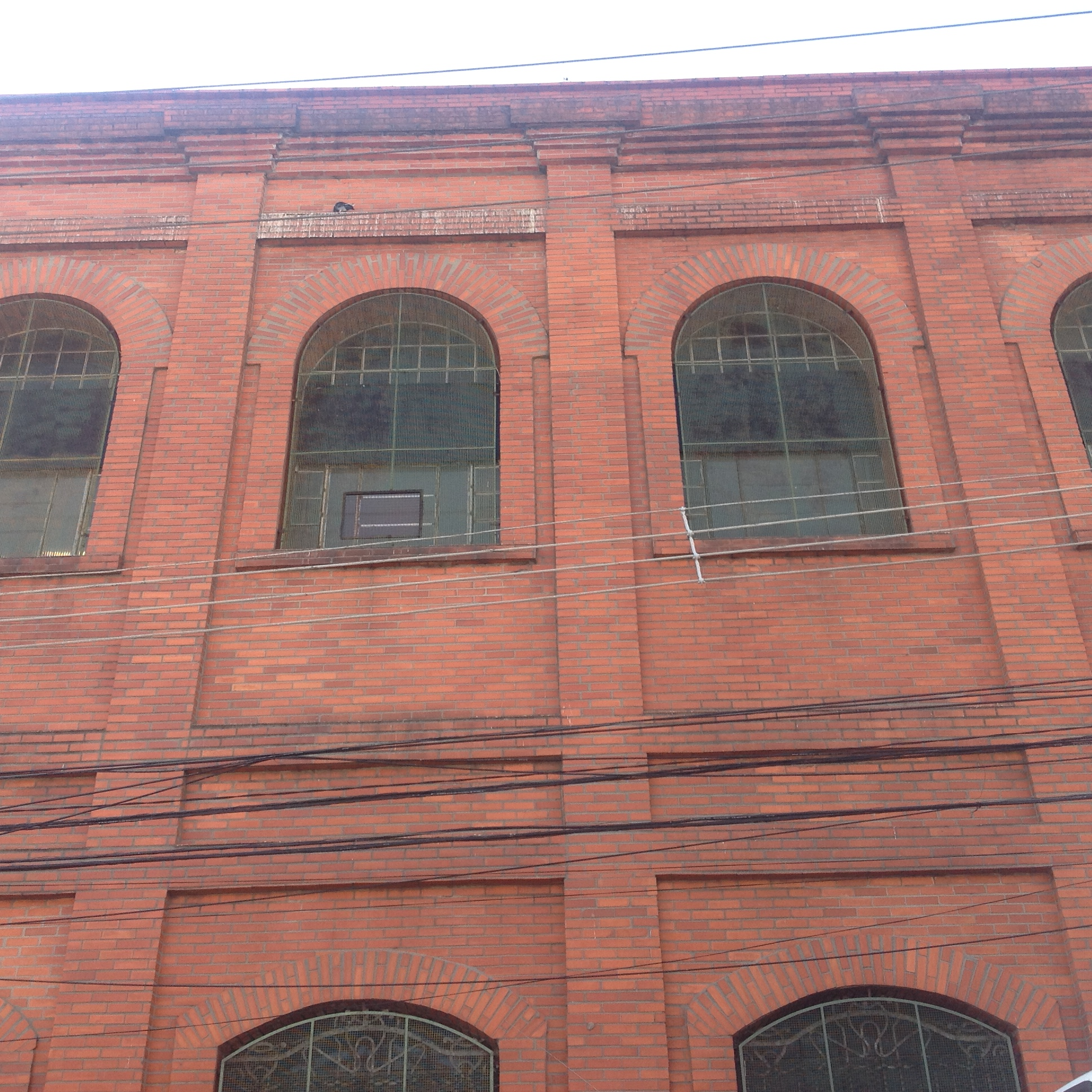 Fachada da fábrica de tecelagem Mariângela. Detalhes do edifício de baixo para cima.